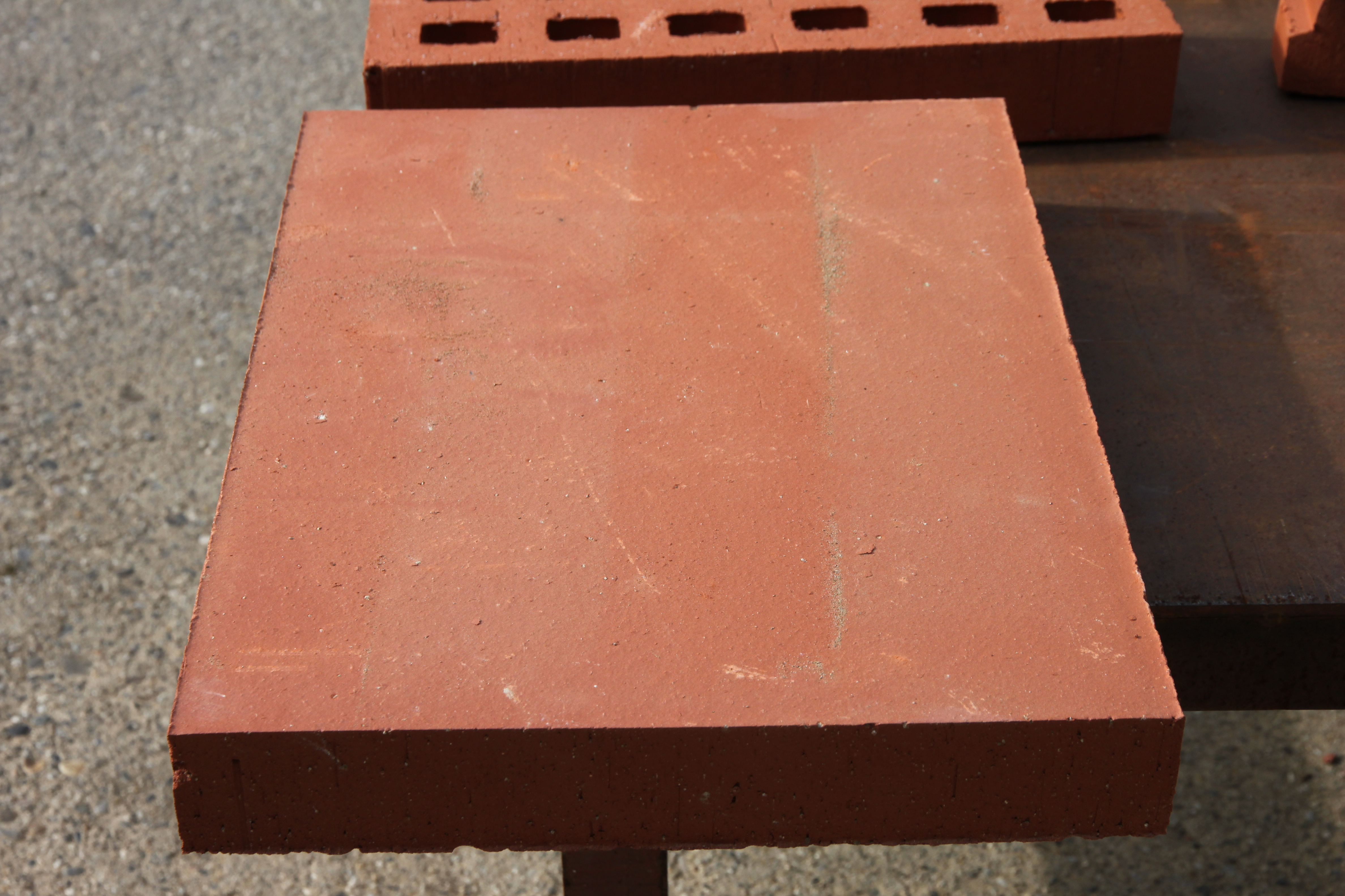 Une brique foraine. Dimensions : 42 x 28 x 5 cm.